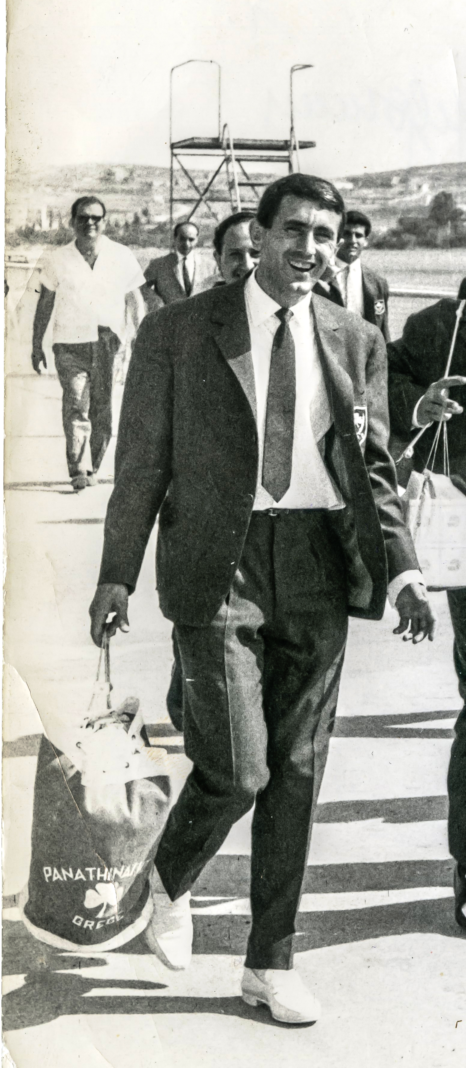 Ο Δημήτρης Θεοφάνης σε αναχώρηση του ΠΑΟ για την Αμερική, 1962